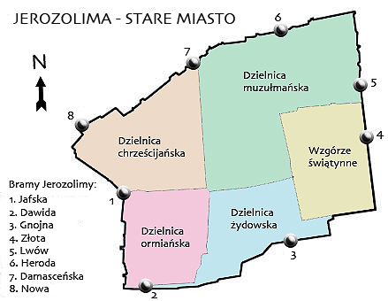 Jerusalem - Gates and walls